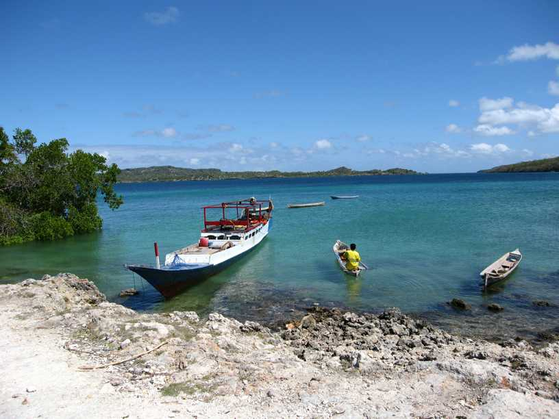 ’Dermaga’ di Desa Oebou Pulau Terluar Indonesia